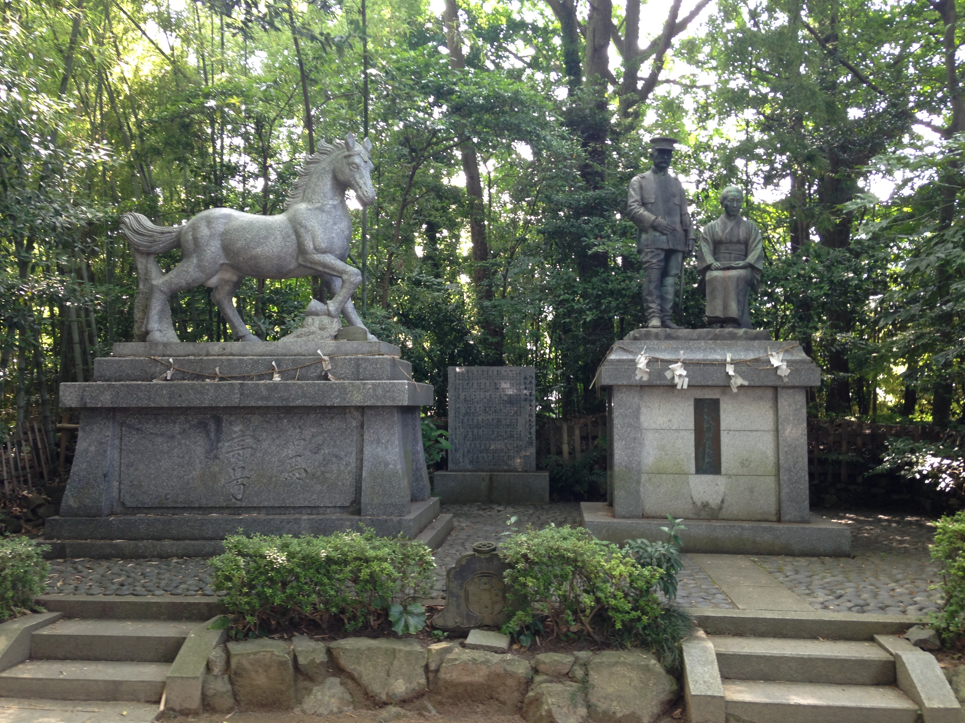 城下町長府・乃木神社境内の乃木希典将軍夫妻像と名馬寿号の像